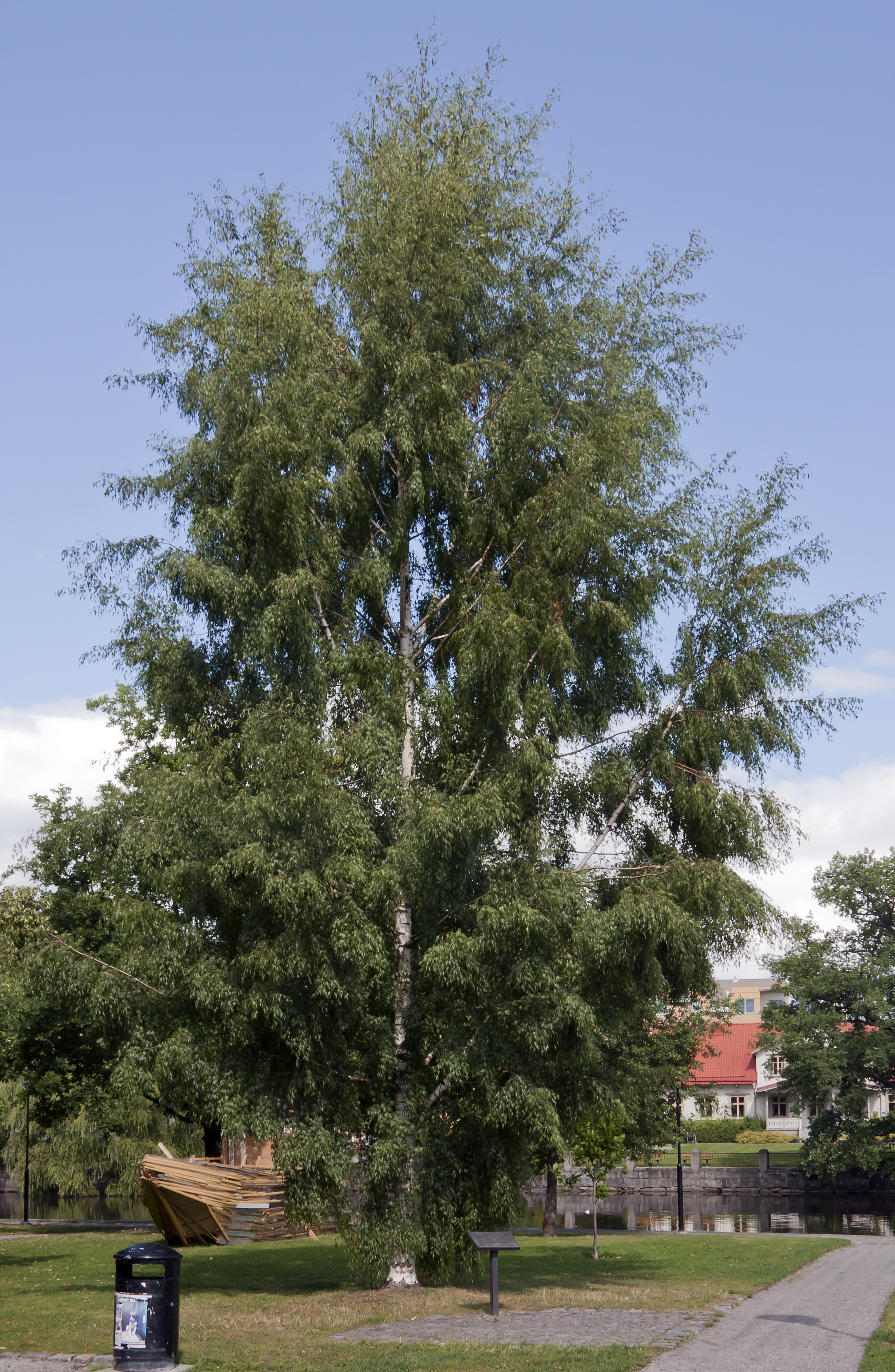 Riksträdet i Örebro, en ornäsbjörk.